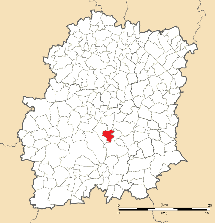 Carte de position de Villeneuve-sur-Auvers en Essonne (91)